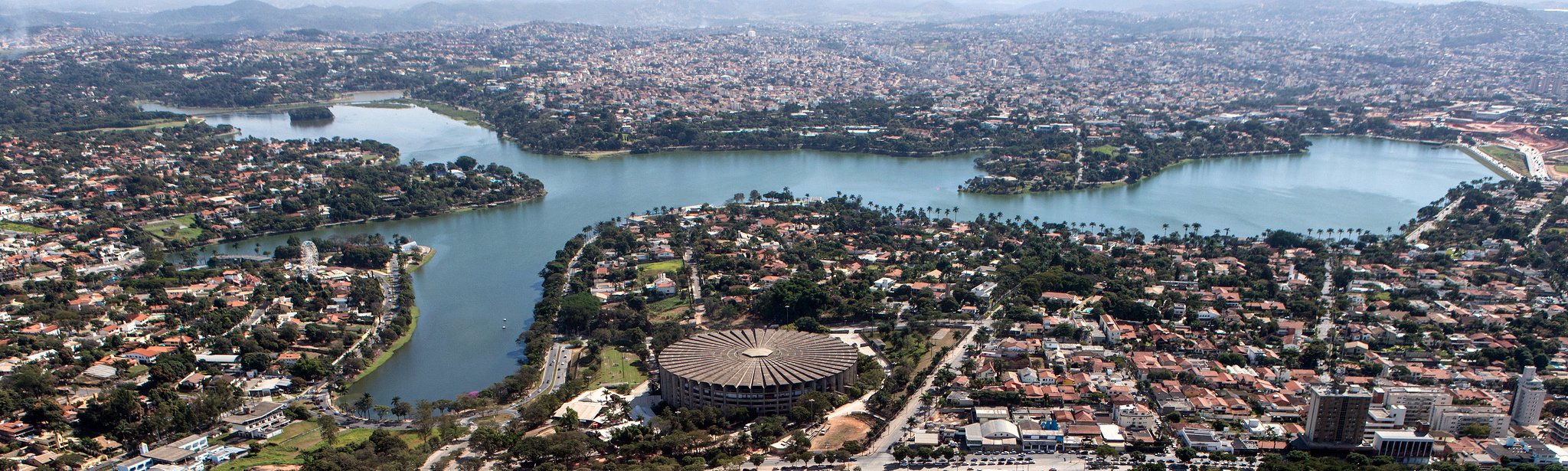 Estádio Mineirão e Lagoa da Pampulha (ao fundo), em Belo Horizonte, Brasil.